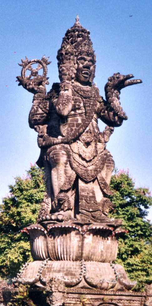 Denpasar, Bali - Indonesia